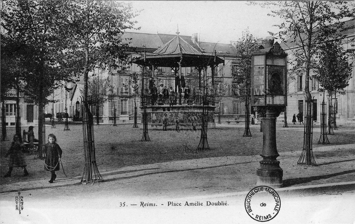 issu des collections de la B.MM. de Reims.